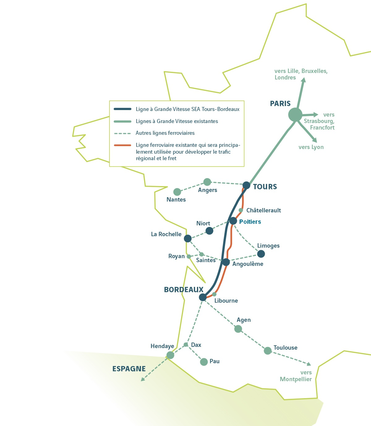 Intégration de la LGV Sud Europe Atlantique au sein du réseau ferré national existant